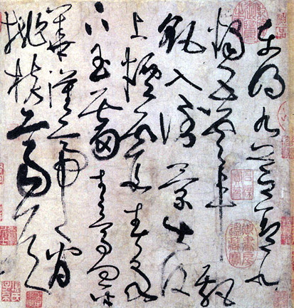 唐朝书法家张旭作品《古诗四帖》局部。